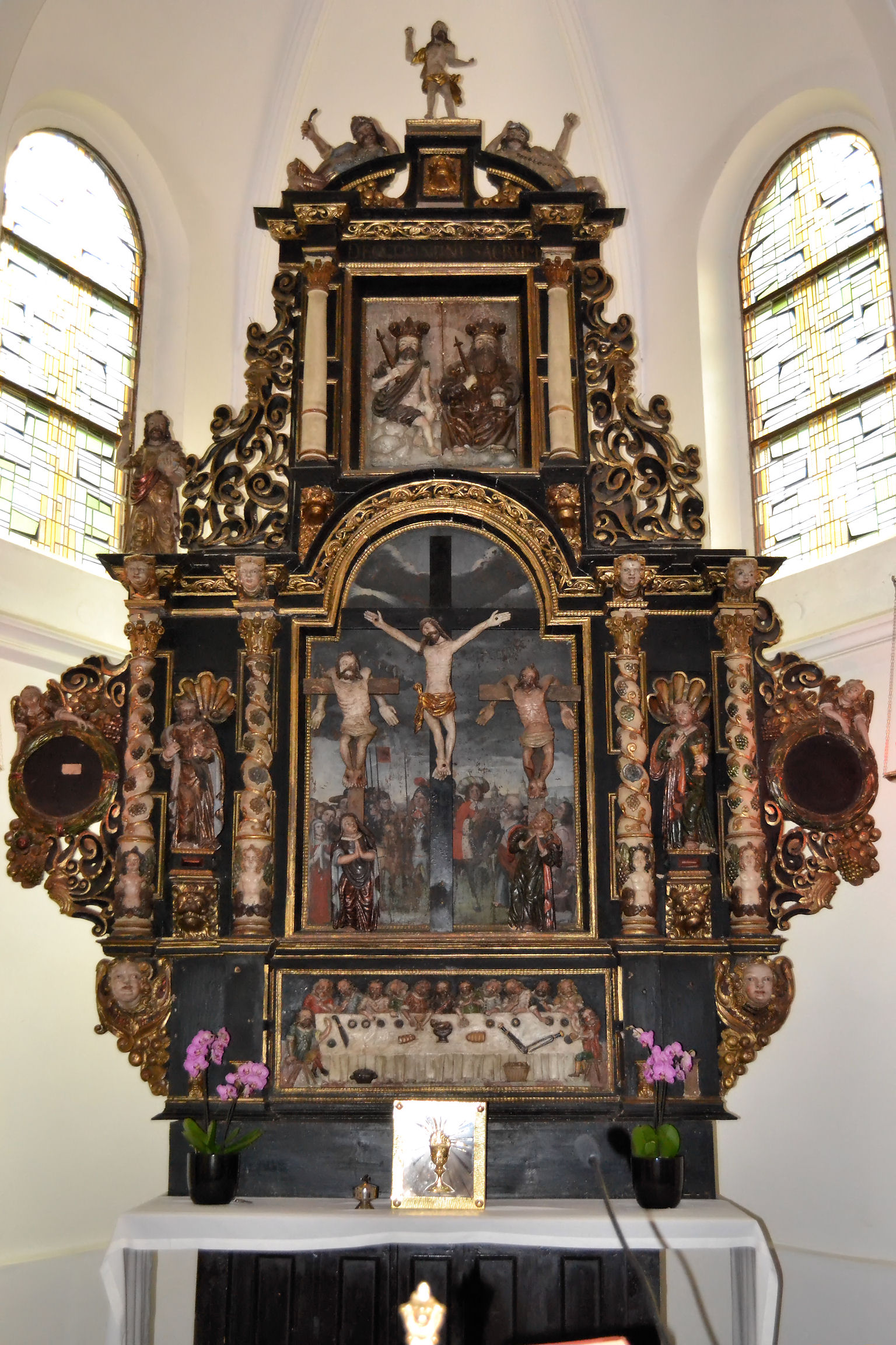 Neogotycki kościół Miłosierdzia Bożego w Trzęsaczu